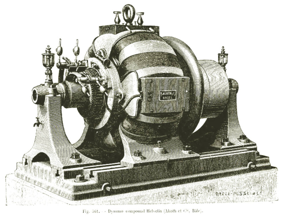 Dynamo Alioth modèle "Elvetia" bobinée en anneau au stator. Année modèle:1884